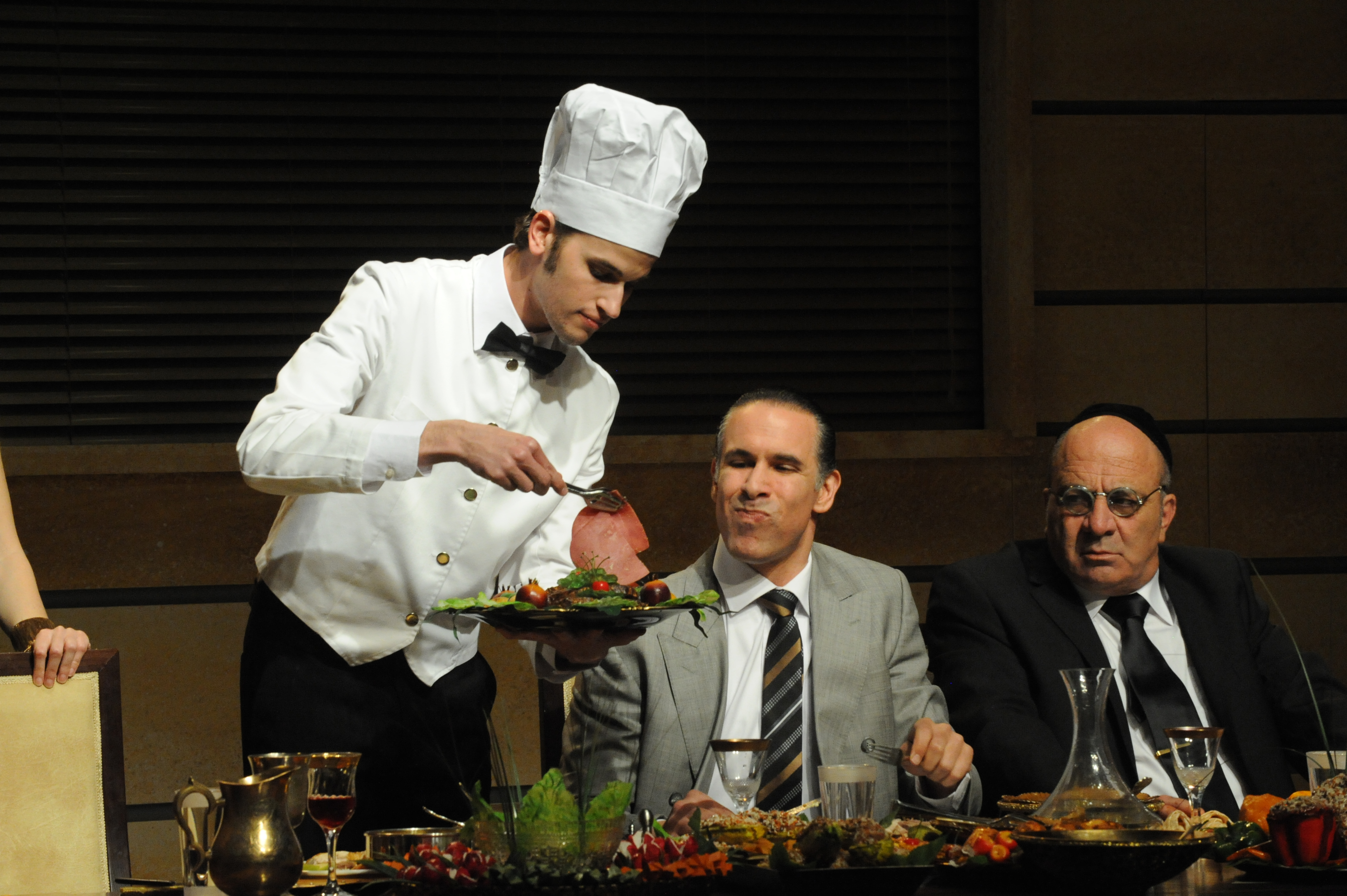 ההצגה "אוכלים" בבימויו של מיקי גורביץ', תיאטרון החאן, 2011